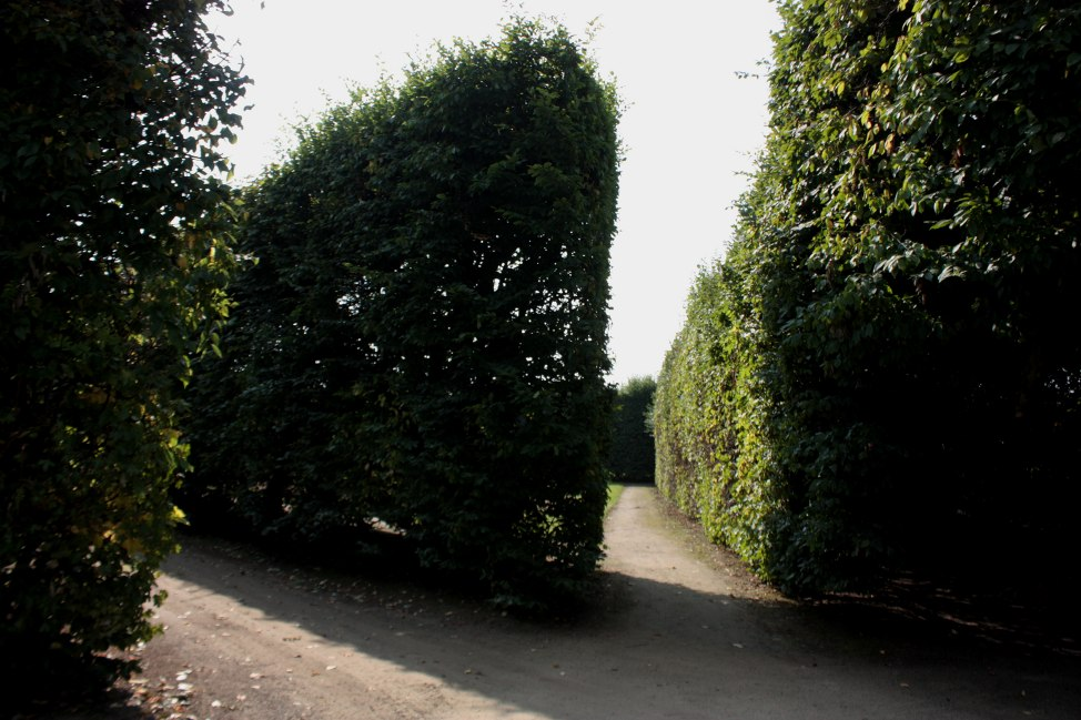 Živý plot , Kroměříž, Květná zahrada